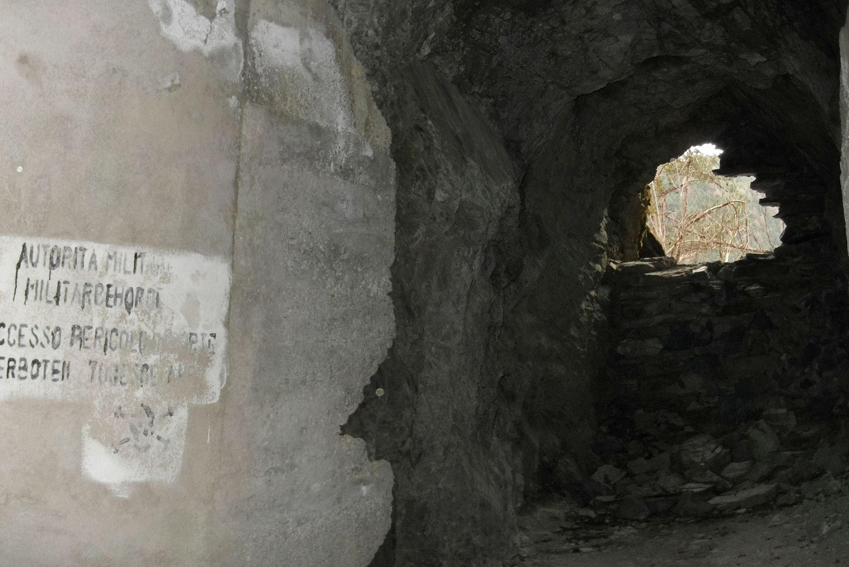 Opera 28 - Sbarramento Rienza-Rio Valles-Sciaves